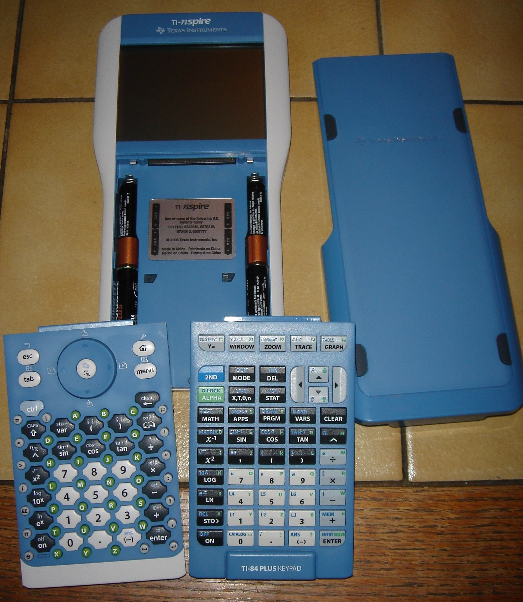 TI-Nspire (ohne CAS), mit Standard-Keypad und TI-84 Plus Keypad (zur Emulation eines TI-84 Plus Silver Edition). Das TI-84 Plus Keypad besitzt einen I/O-Port zur Kommunikation mit anderen TI-84 Plus/83 (Plus), da der Nspire selbst nur einen USB-Anschluss zur Verfügung stellt.